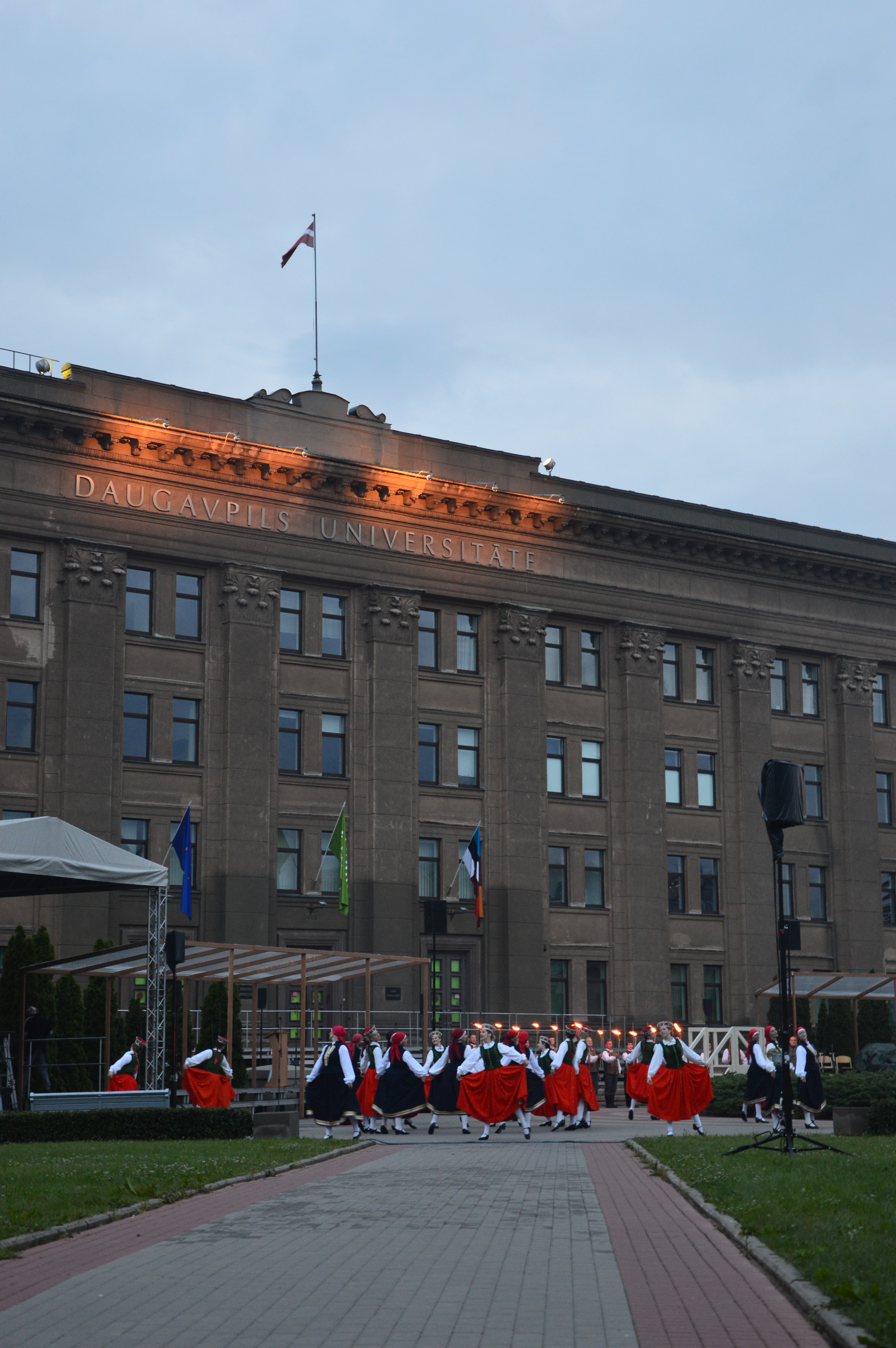 Gaudeamus Daugavpilsis.